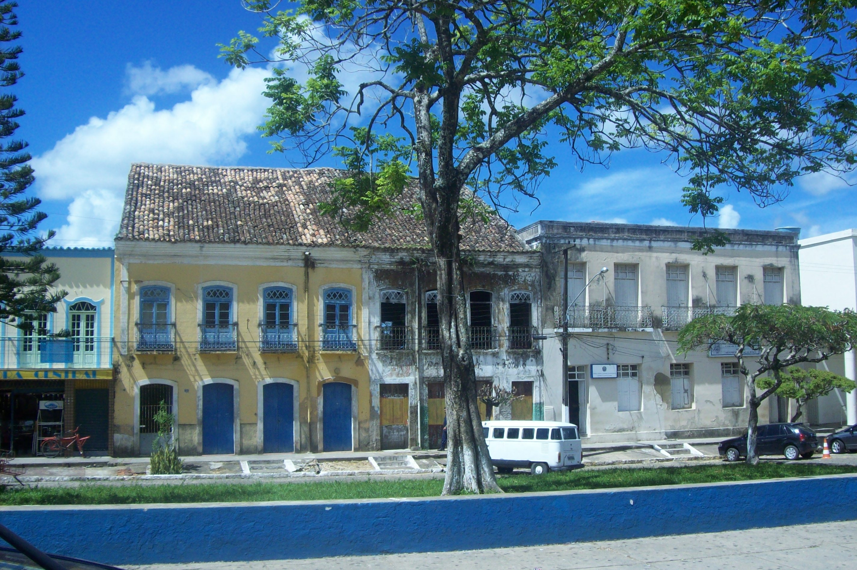 Casario do início do século XX, na cidade de Rio Formoso, Pernambuco, Brasil.